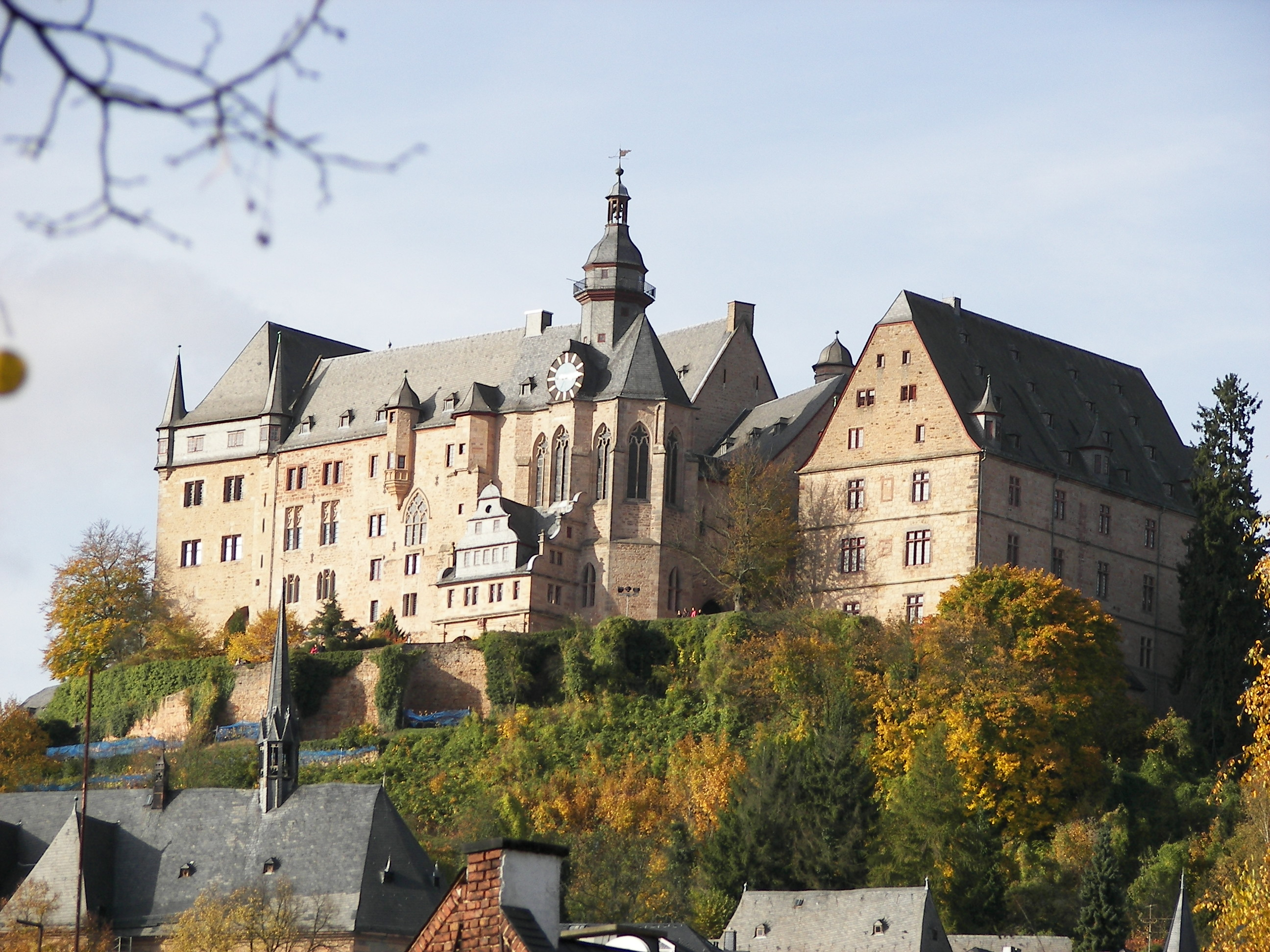 Marburger Schloss von Südosten